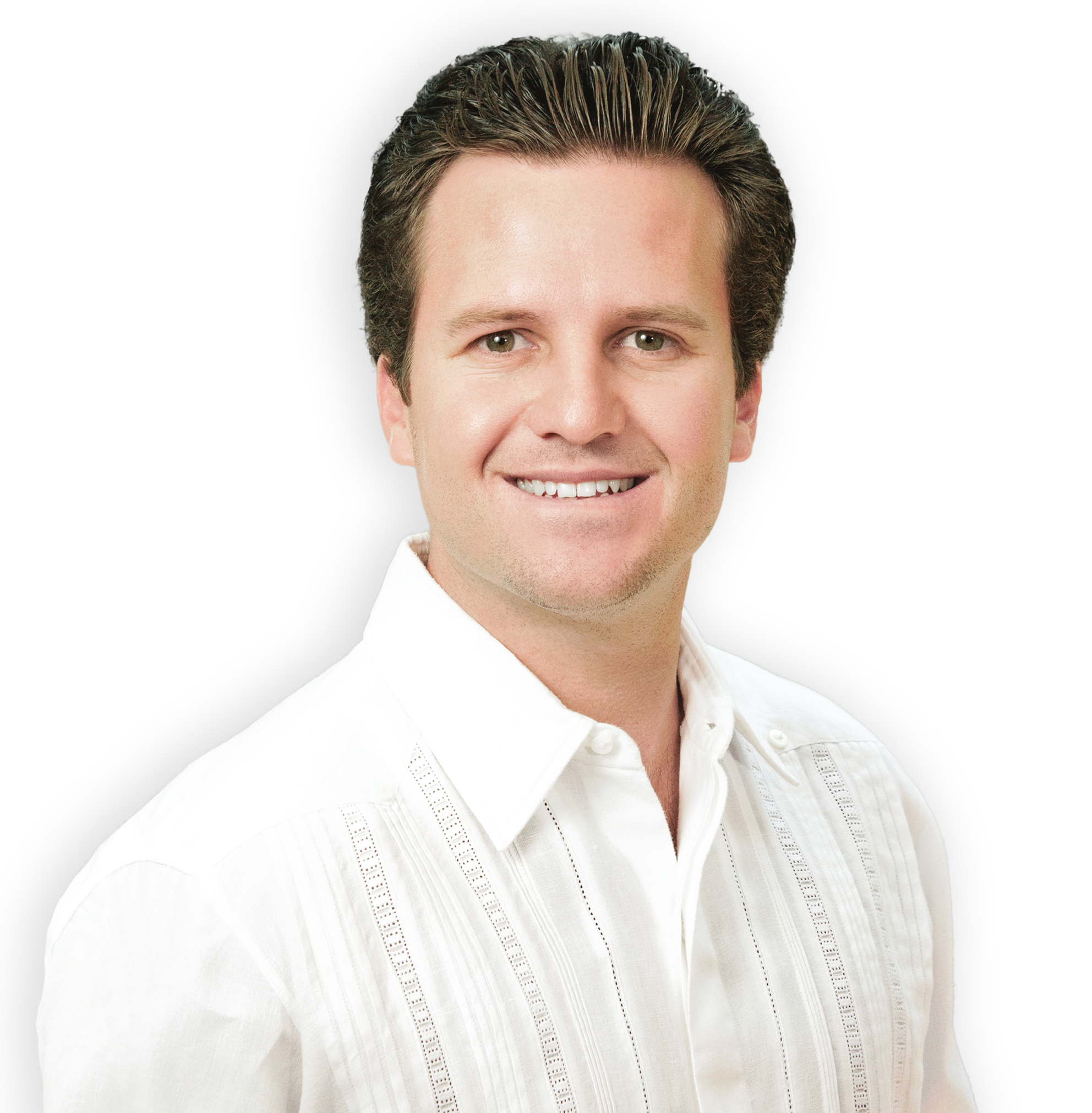 Gerardo Gaudiano Rovirosa, político de Tabasco